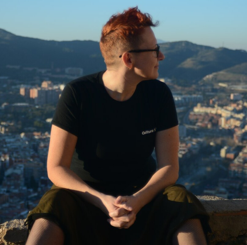 Fotografía de Brigitte Vasallo